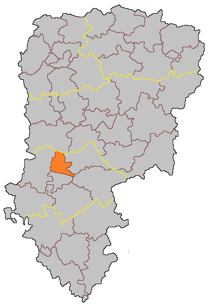 Кантон Суассон-Север на карте департамента Эна